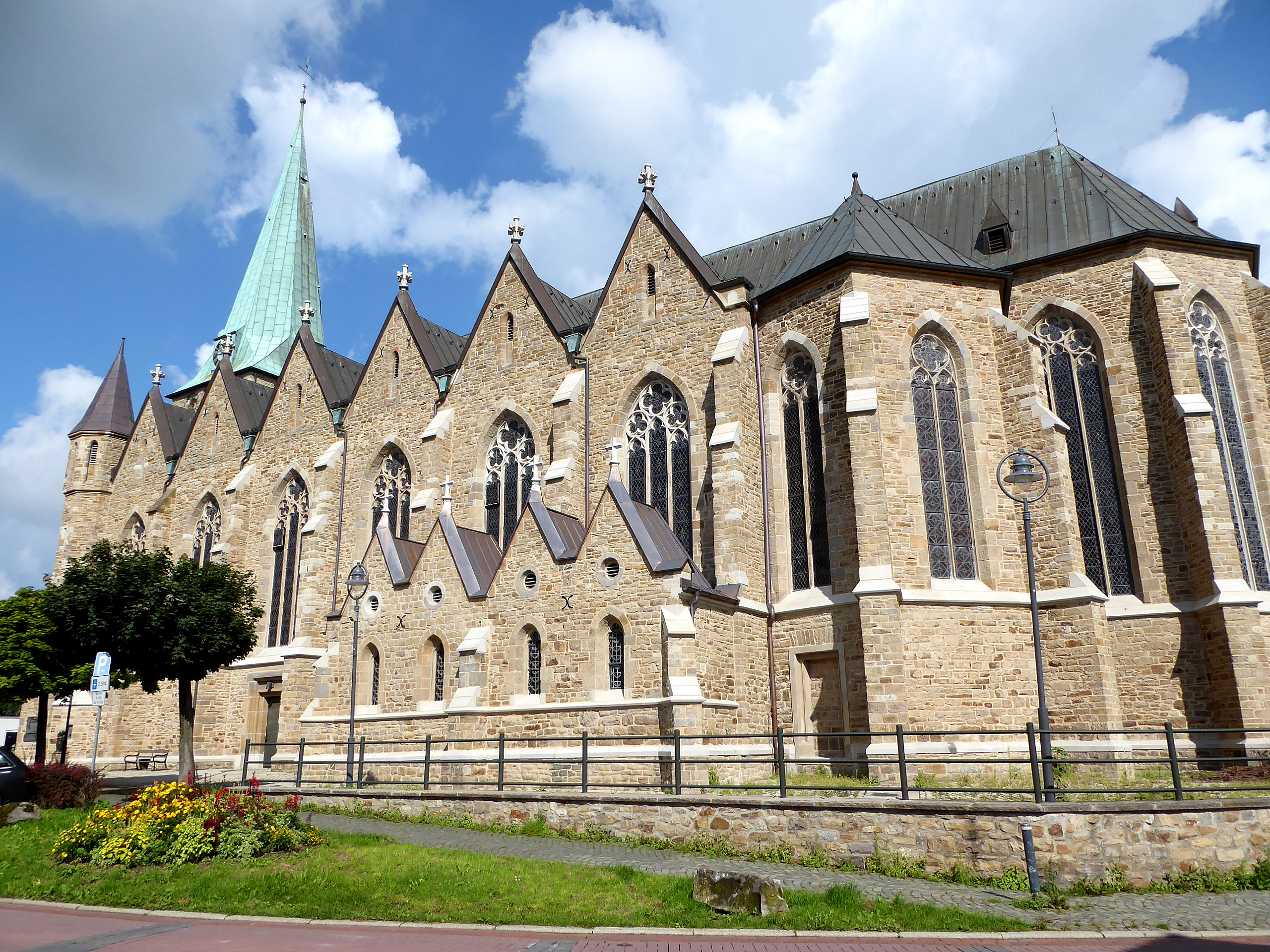 Umfassende Sanierung der Außenfassaden nach drei Jahren im Mai 2017 abgeschlossen. Südfassade